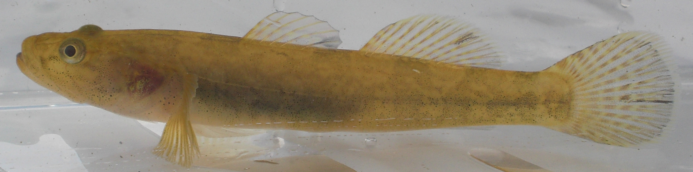 English;This is Gymnogobius urotaenia. Japaese;ウキゴリと思われる。投稿者により撮影された。2009年11月1日、愛知県名古屋市の山崎川の瑞穂公園陸上競技場付近で採取、撮影。